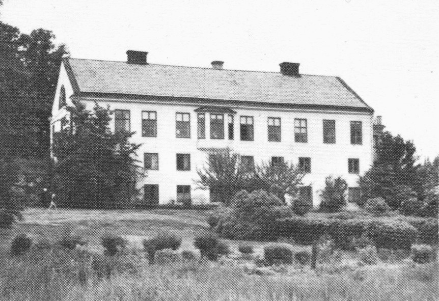 Velamsunds huvudbyggnad